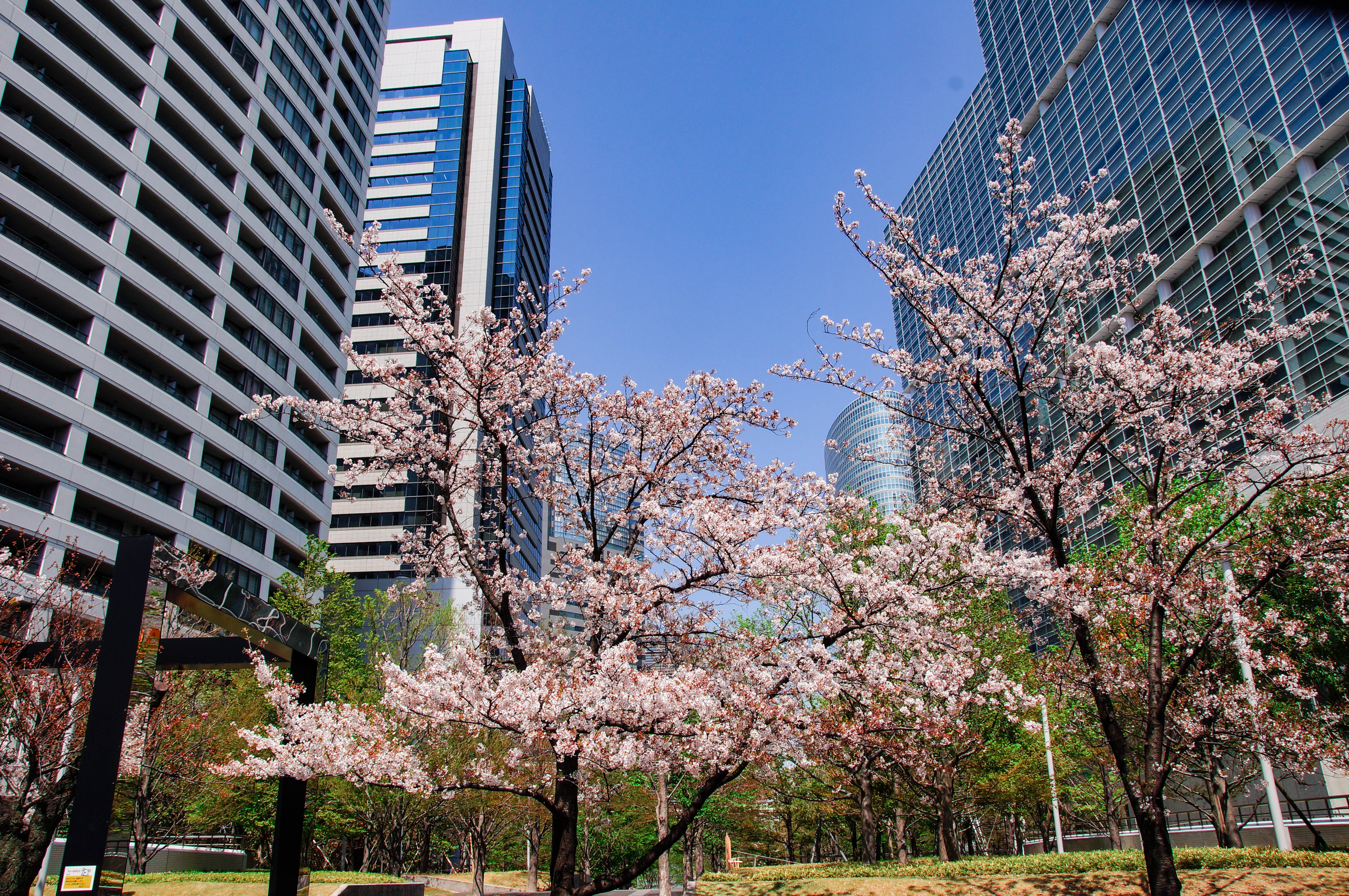 杜の公園（品川）Sony SLT-A57